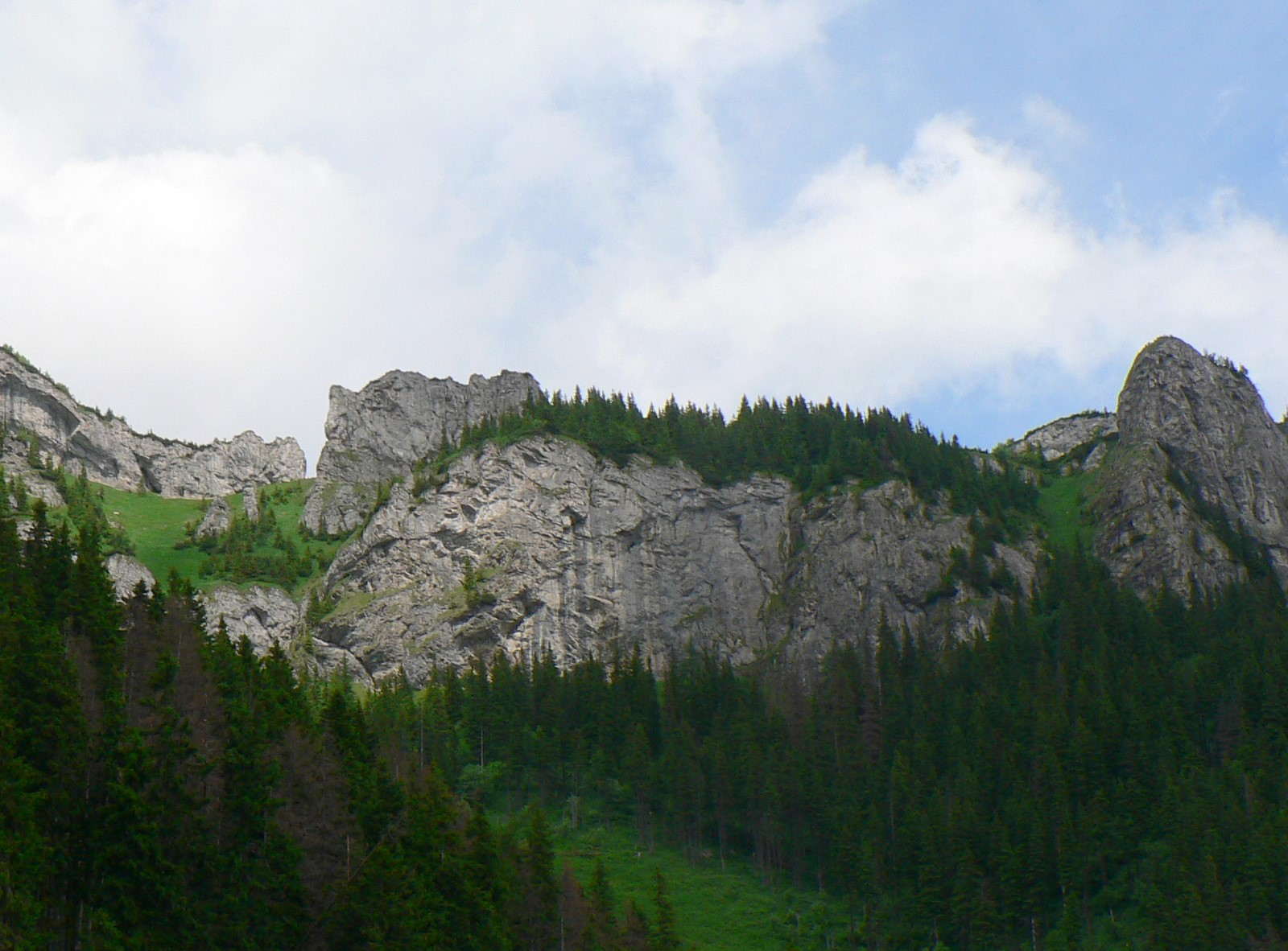 Skalne Wrota i Kozi Grzbiet ze szlaku ze Schroniska pod Szarotką do Doliny Białych Stawów